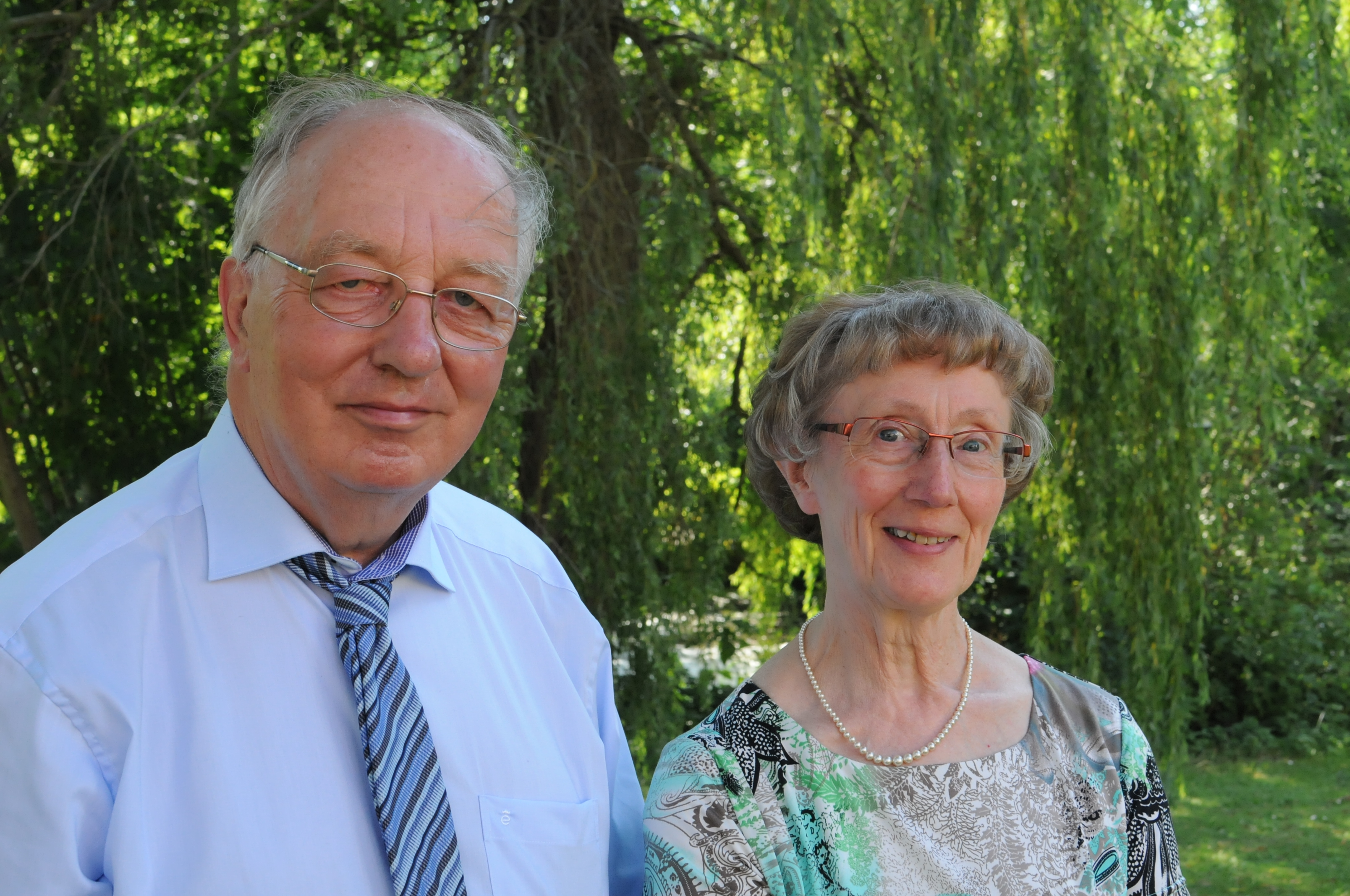 Privat foto til brug for omtale af Helle og Henrik Stub på wikipedia